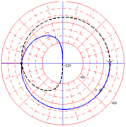 Un ejemplo de un diagrama de Nyquist, polar